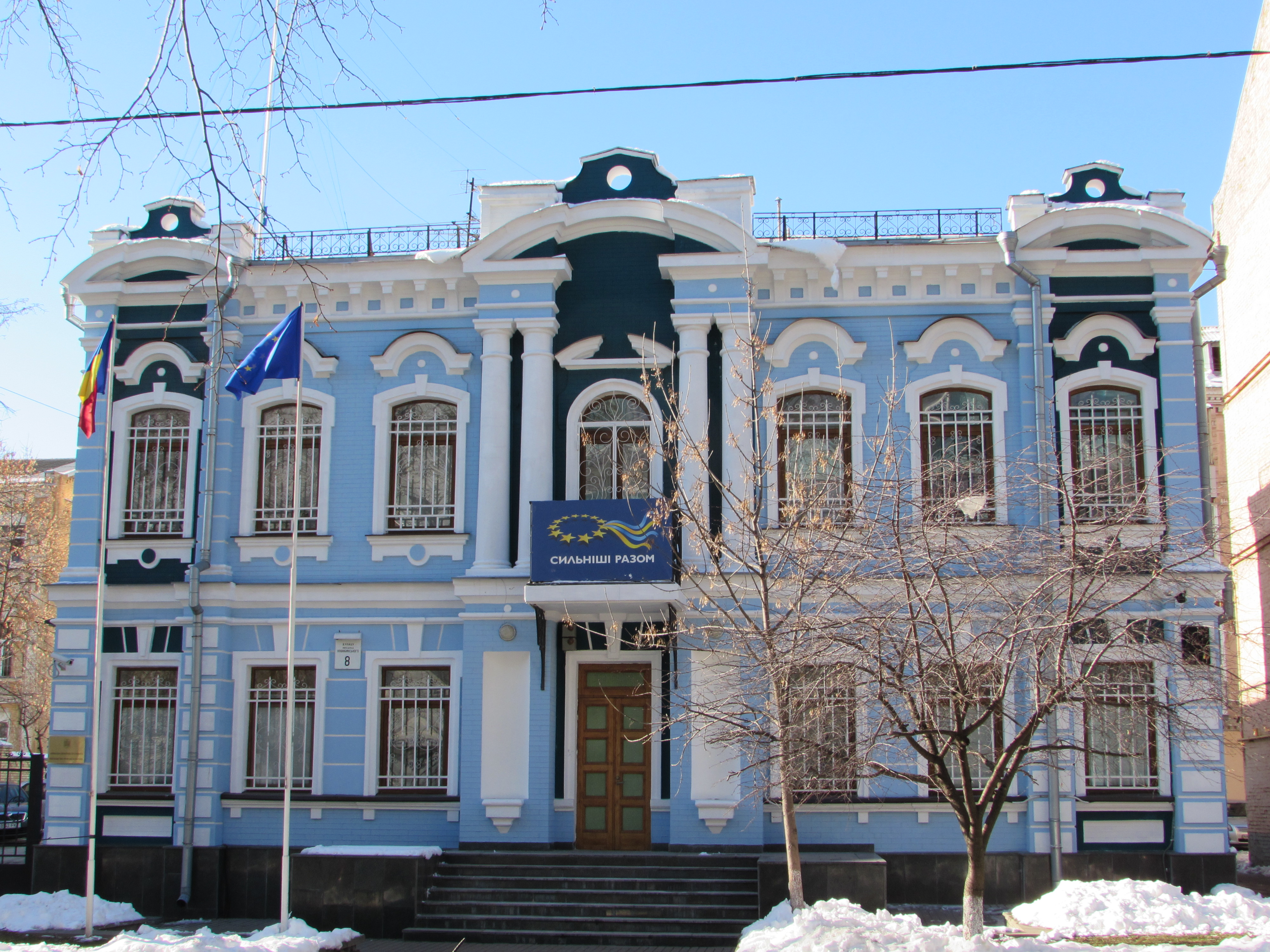 Особняк, Київ, Коцюбинського Михайла вул., 8